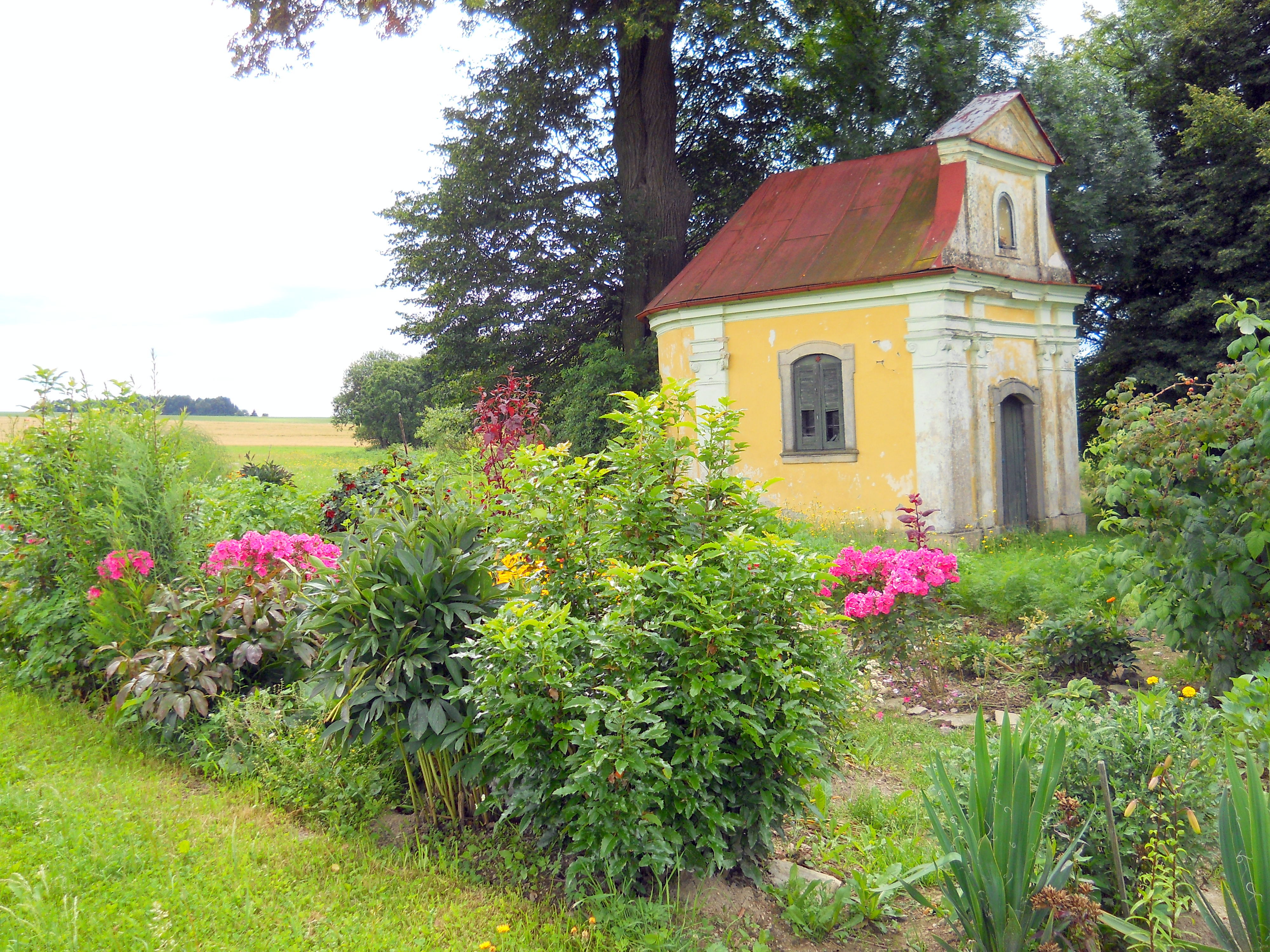 Celkový pohled.